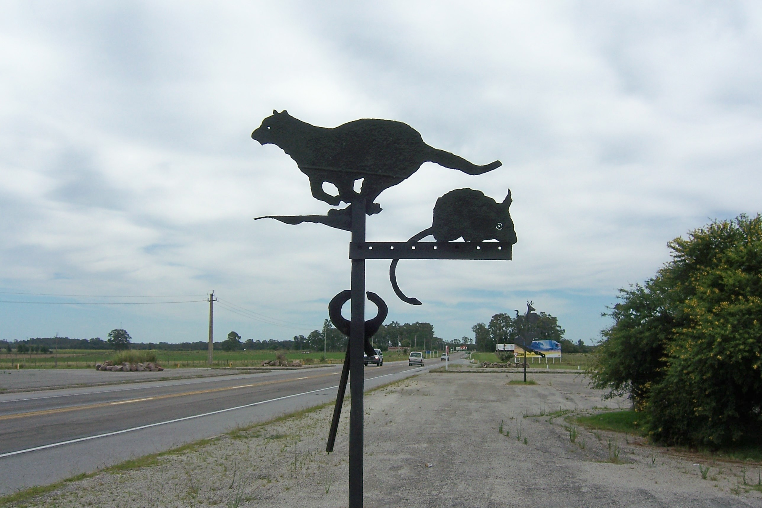 Zooilógico del futuro, grupo escultórico de Martín Arregui, cercano a la ciudad de Trinidad, Uruguay.